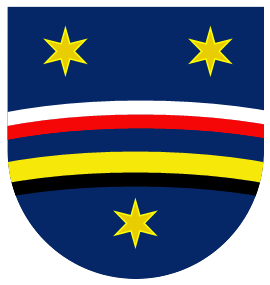 Grb gospodov Semenič iz Valvasorjeve knjige grbov.